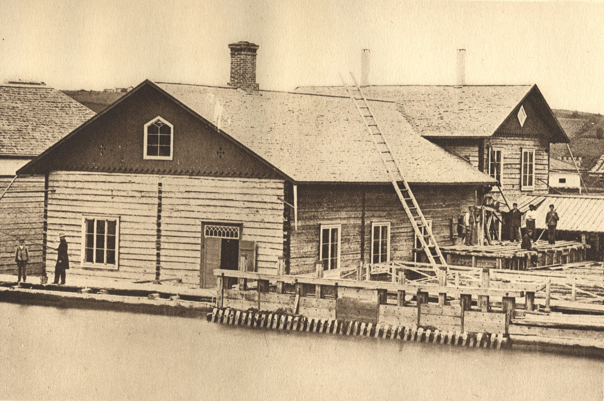 Tampereen Puuhiomo 1870-luvulla.